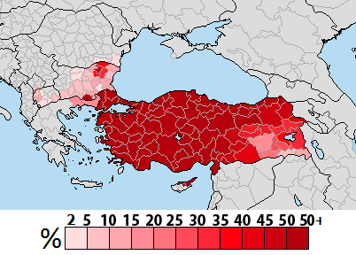 Türkische Bevölkerung nach Provinzen jedes Land.